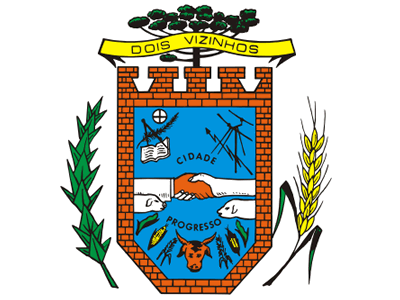 Brasão da cidade de Dois Vizinhos.